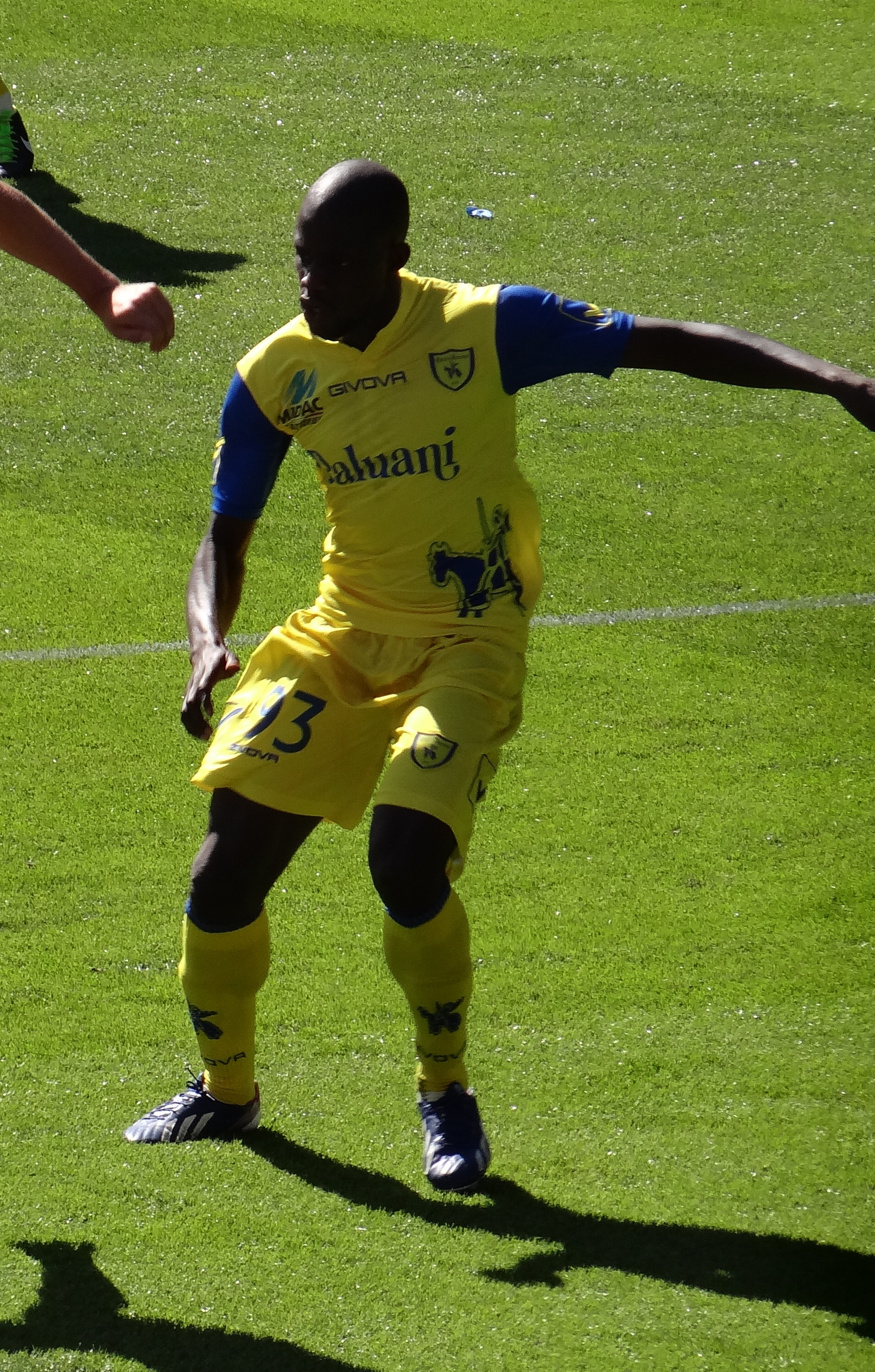 Boukary Dramé